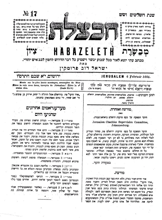 Chawatzelet, eine hebräische Zeitung vom 5. Februar 1906 bzw. 10. Schwat 5666